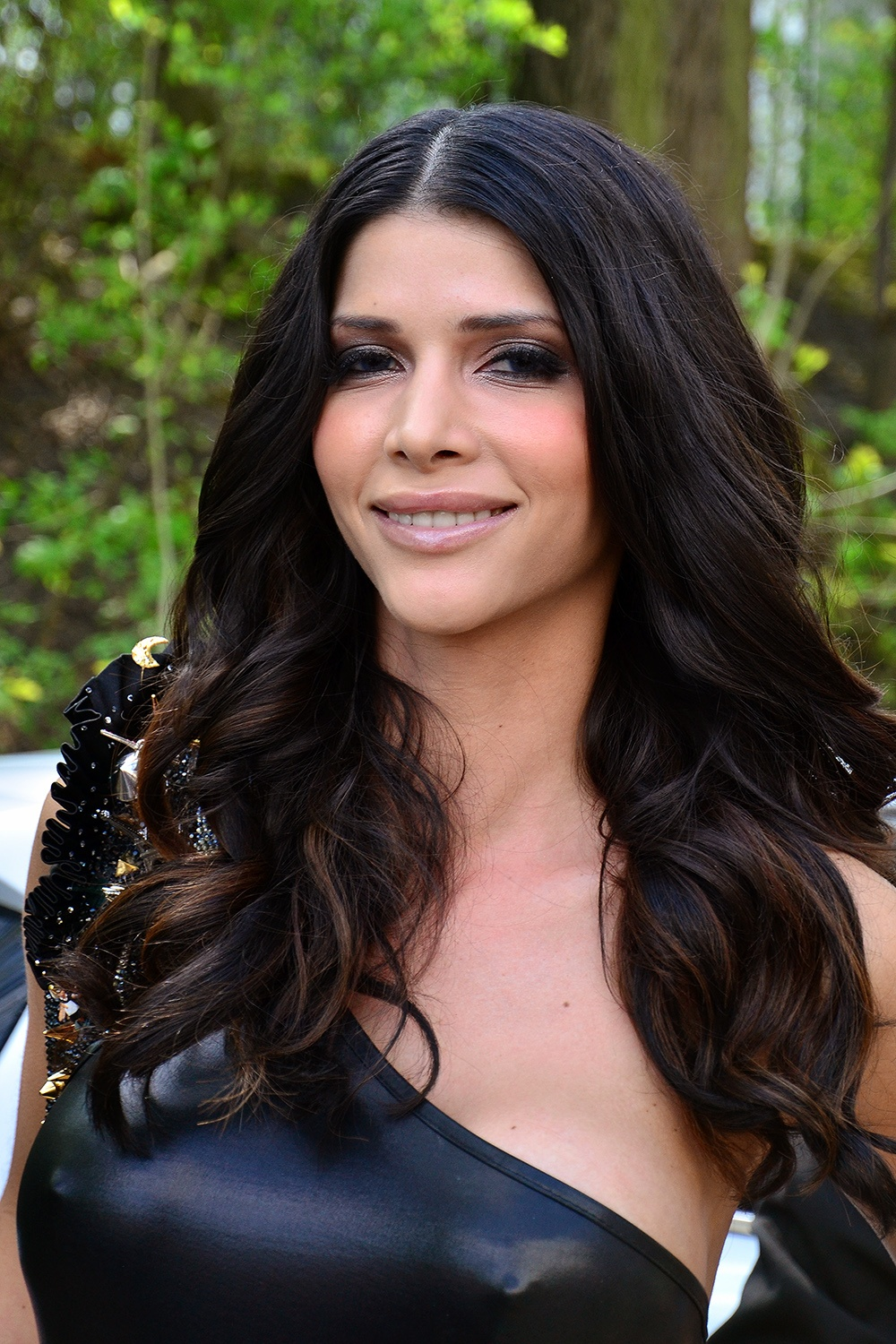 BILDRenntag 2013, Datum/Uhrzeit: 01.05.2013 14:11:37